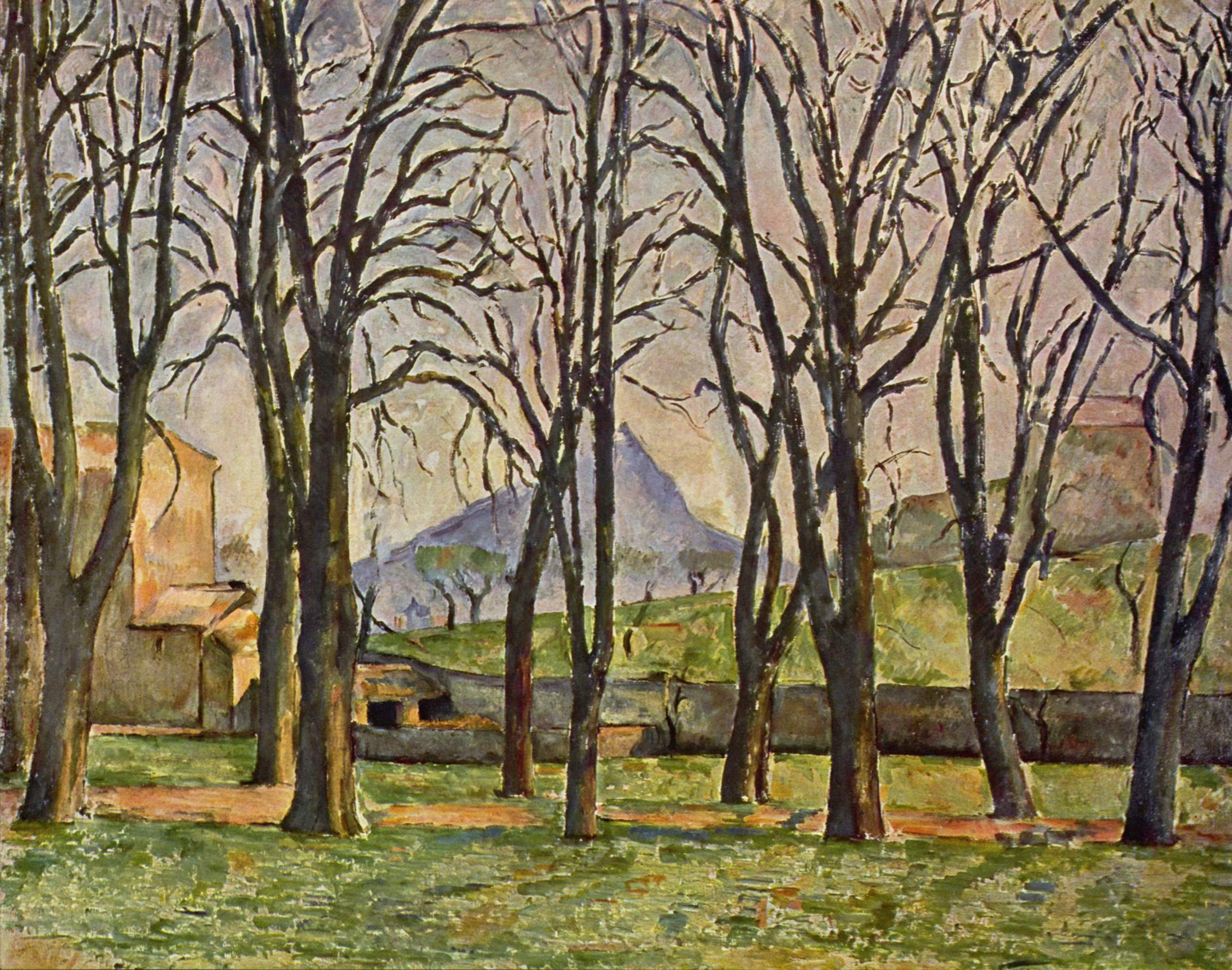 Chestnut Trees at Jas de Bouffanlabel QS:Len,"Chestnut Trees at Jas de Bouffan" label QS:Lde,"Kastanienbäume im Jas de Bouffan" label QS:Lfr,"Arbres de châtaigne au Jas de Bouffan"